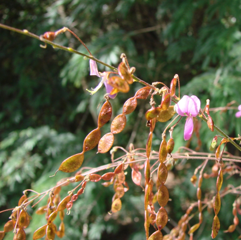 Desmodium discolor - FABACEAE Parque Olhos D'Água - Brasília - Distrito Federal - Brasil.